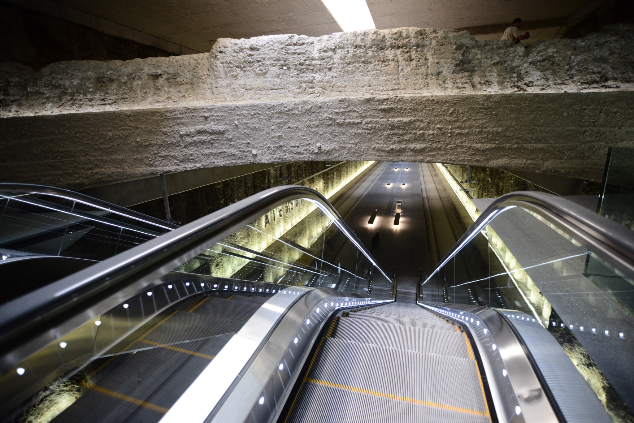 Estación de Alcázar Genil